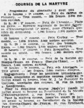 Le programme des courses de chevaux de La Martyre du dimanche 3 août 1924 tel qu'il a été publié dans le journal Ouest-Éclair du 11 juillet 1924